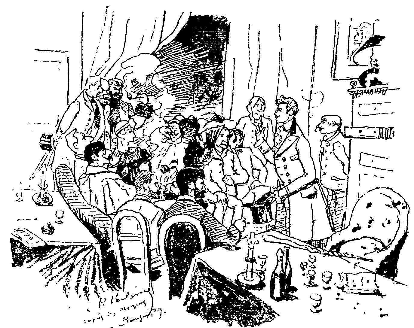 Dessin de Paul Verlaine (1844-1896) : Une soirée chez Paul Verlaine à l'hôtel meublé de l'impasse Royer-Collard en 1889.